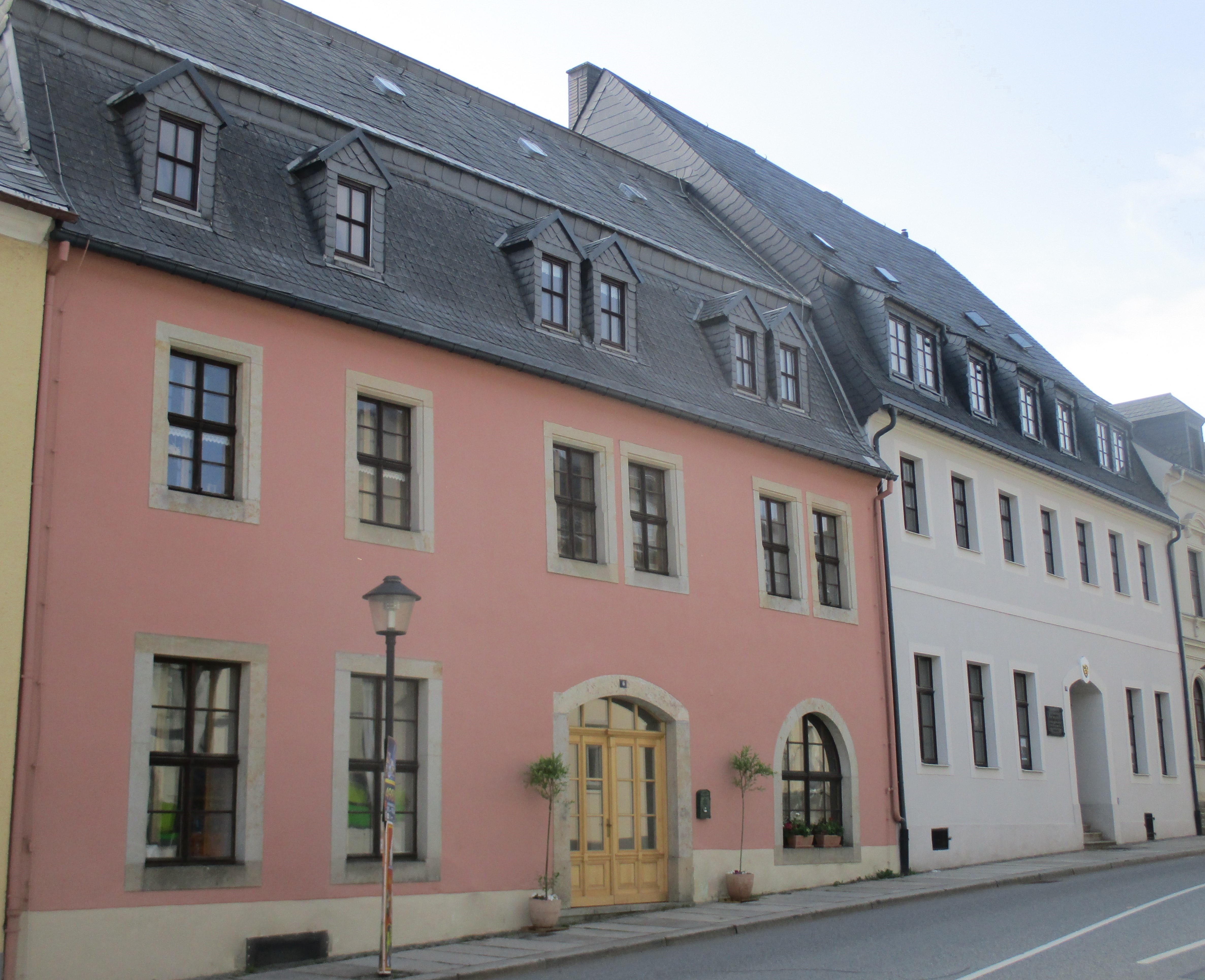 Friedrich Wilhelm Heinrich von Trebra, sächsischer Oberberghauptmann und Freund Johann Wolfgang von Goethes, war vom 22. Oktober 1774 bis 27. September 1780 Hausbesitzer des Gebäudes Freiberger Str. 6 neben dem Gebäude Freiberger Str. 4, welches als Bergamt einer öffentliche Nutzung diente und in welchem er auch zeitweise in der Wohnung des Bergmeisters wohnte, um das Geschehen im Bergamtshaus zu übersehen.